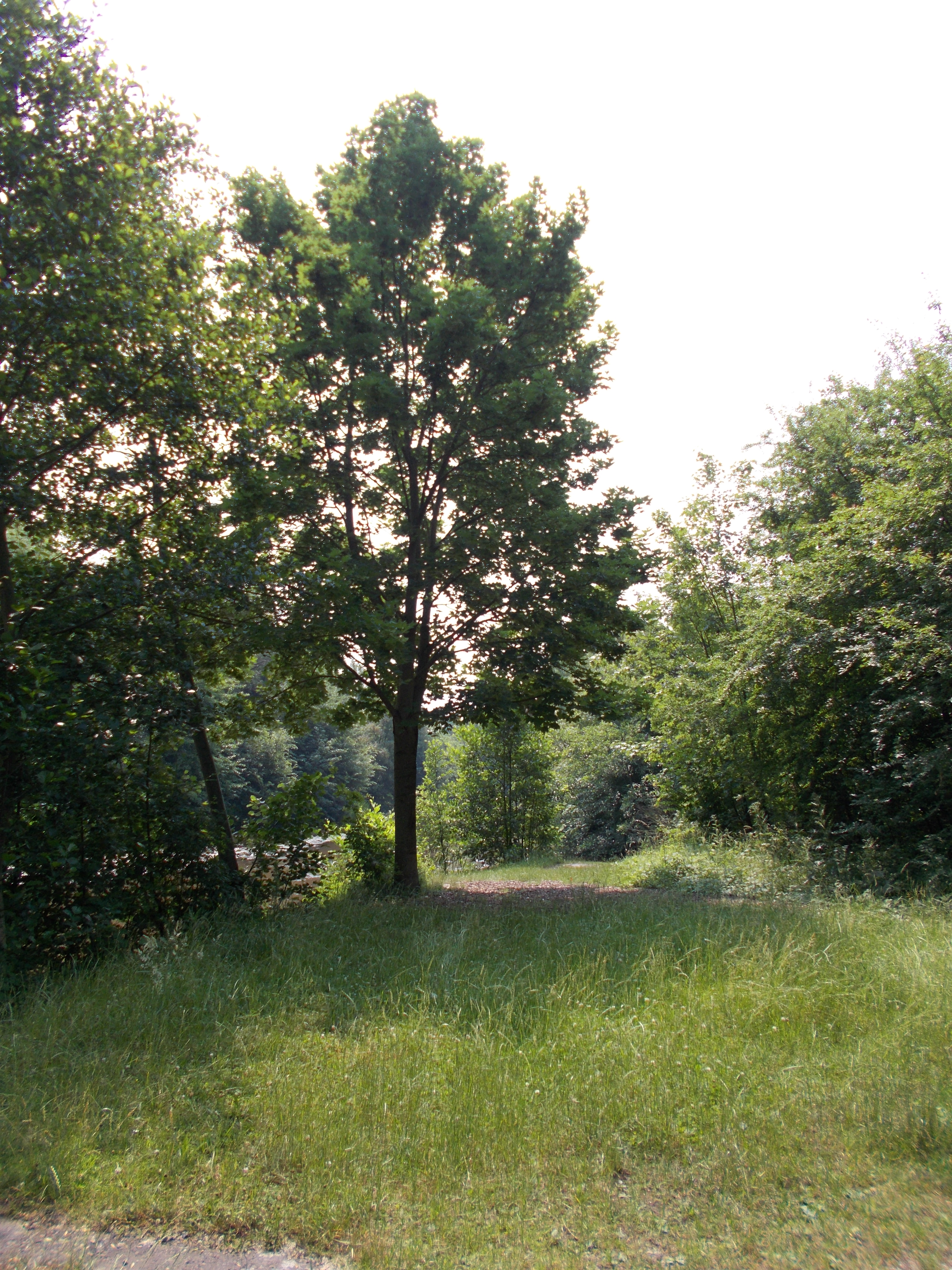 An der Erfthalbinsel Broich fließt die Kasterer Mühlenerft in die Erft. Die Nähe zur Kläranlage ist riechbar. Hier wurde der Werwolf von Epprath hingerichtet.